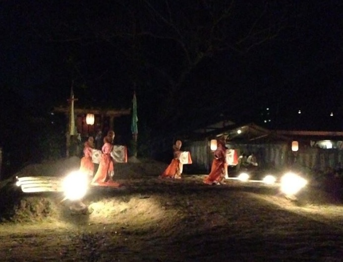 日没後お旅所前で奉納される舞